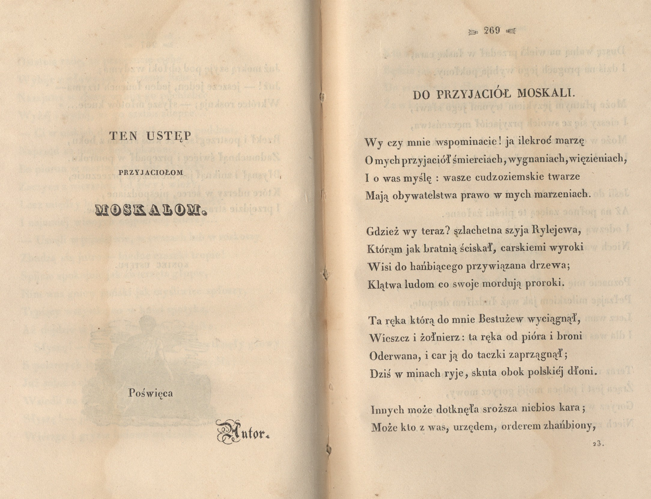 Fragment, z III części Dziadów, z Ustępu